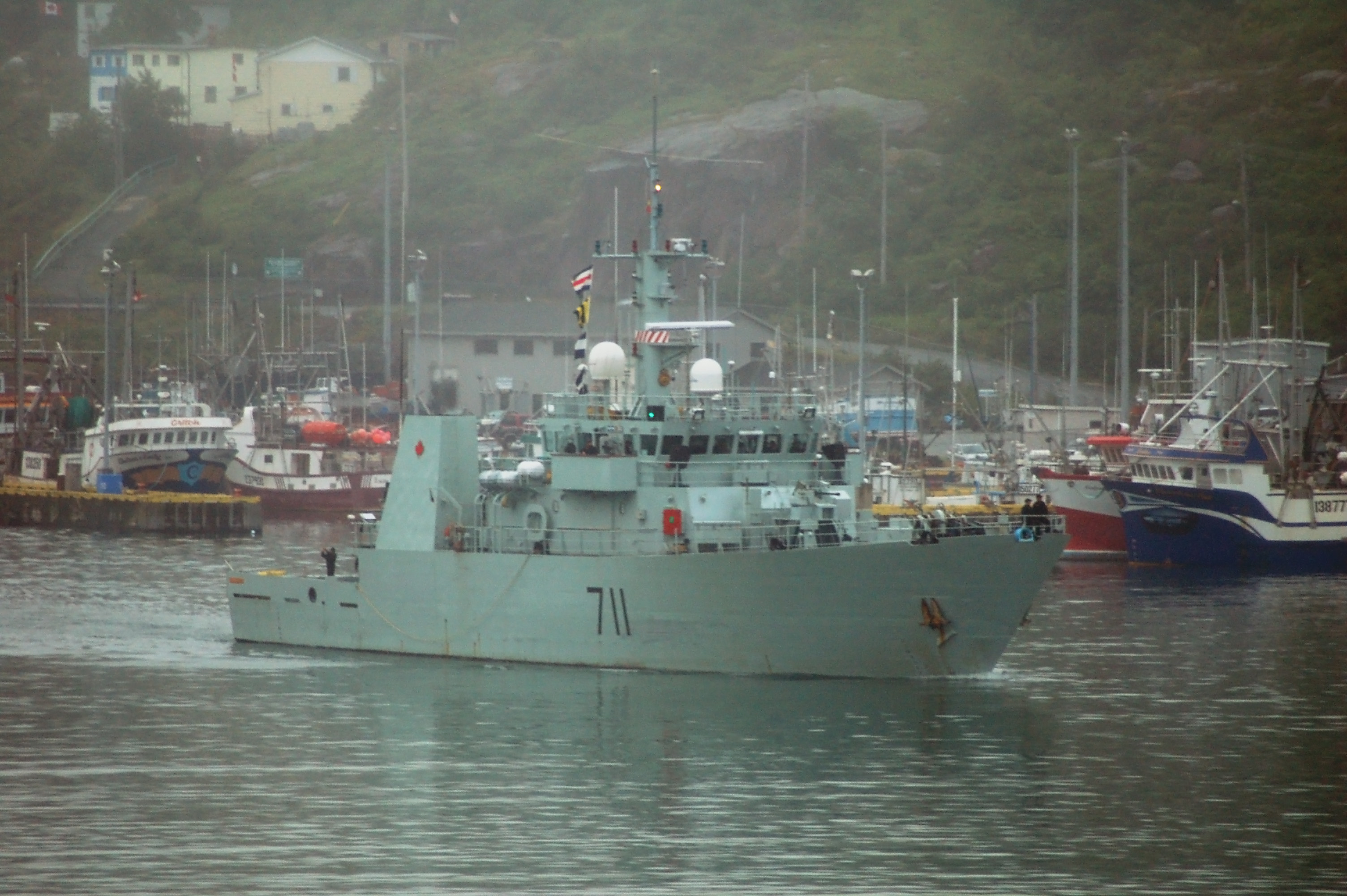 HMCS Summerside entering St John's Harbour.